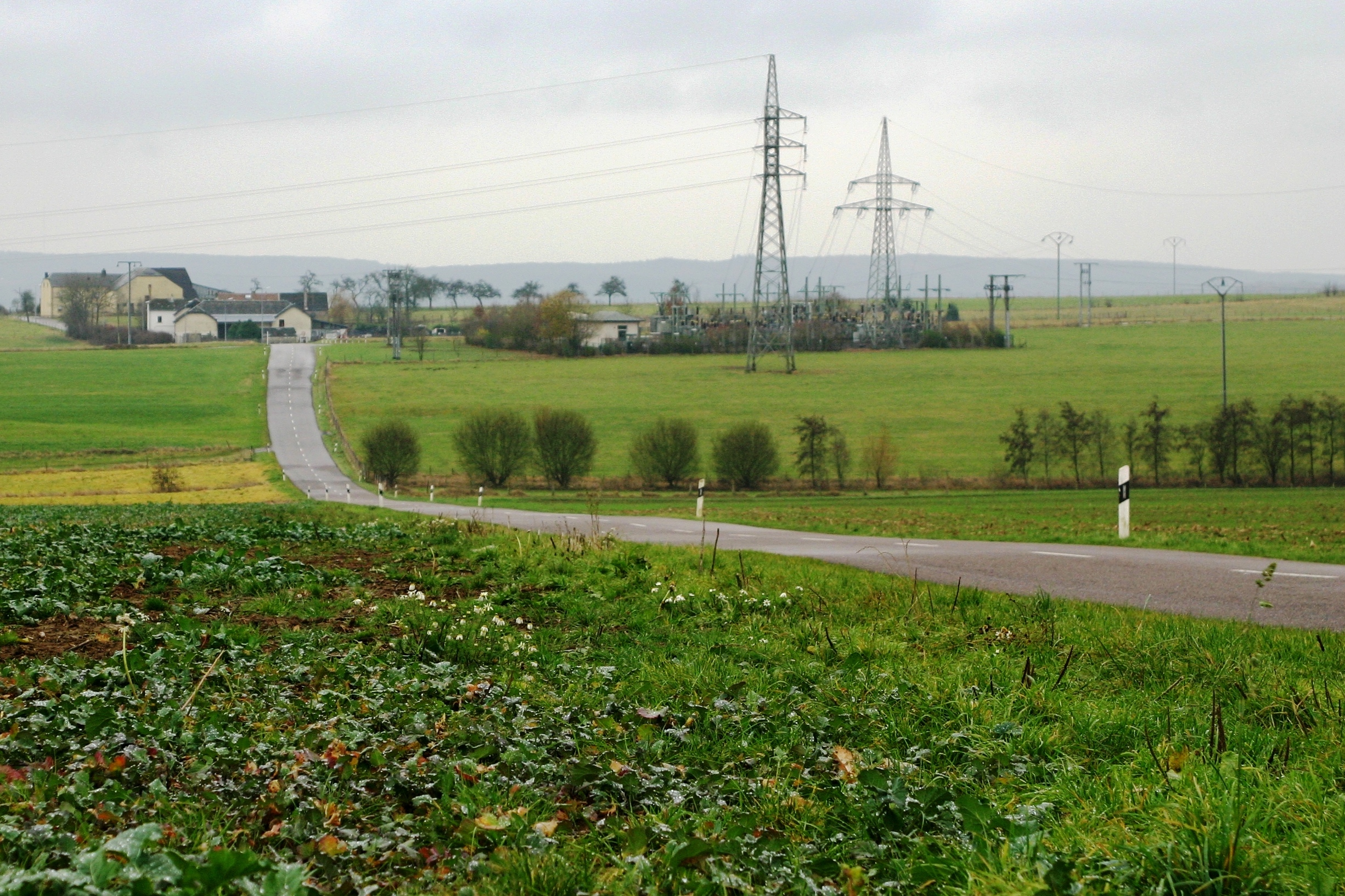 Den CR356 am November 2007 tëscht Suewelbuer a Freckeisen. Hannen am Bild ass Freckeisen, an an der Mëtt geséit en eng Parti vum Quellgebitt vun der Halerbaach. 356